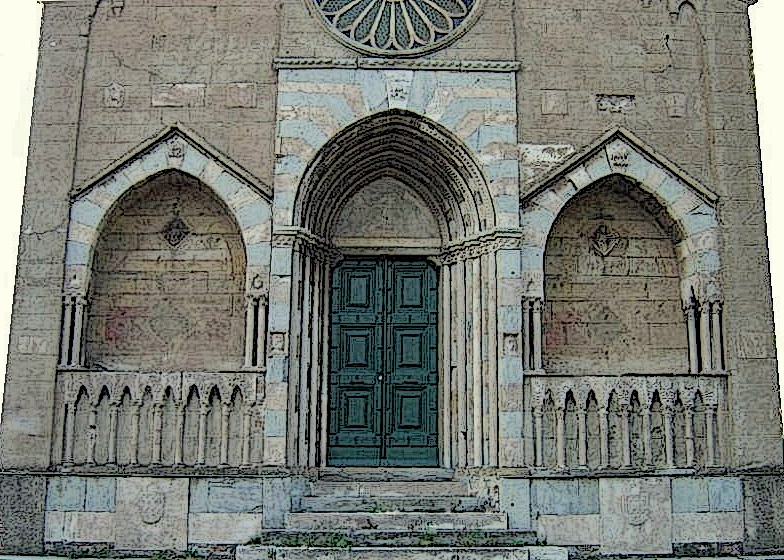 Sezione inferiore della facciata della chiesa dell'abbazia di Sant'Andrea alla Colombara a Genova (Cornigliano - Sestri)